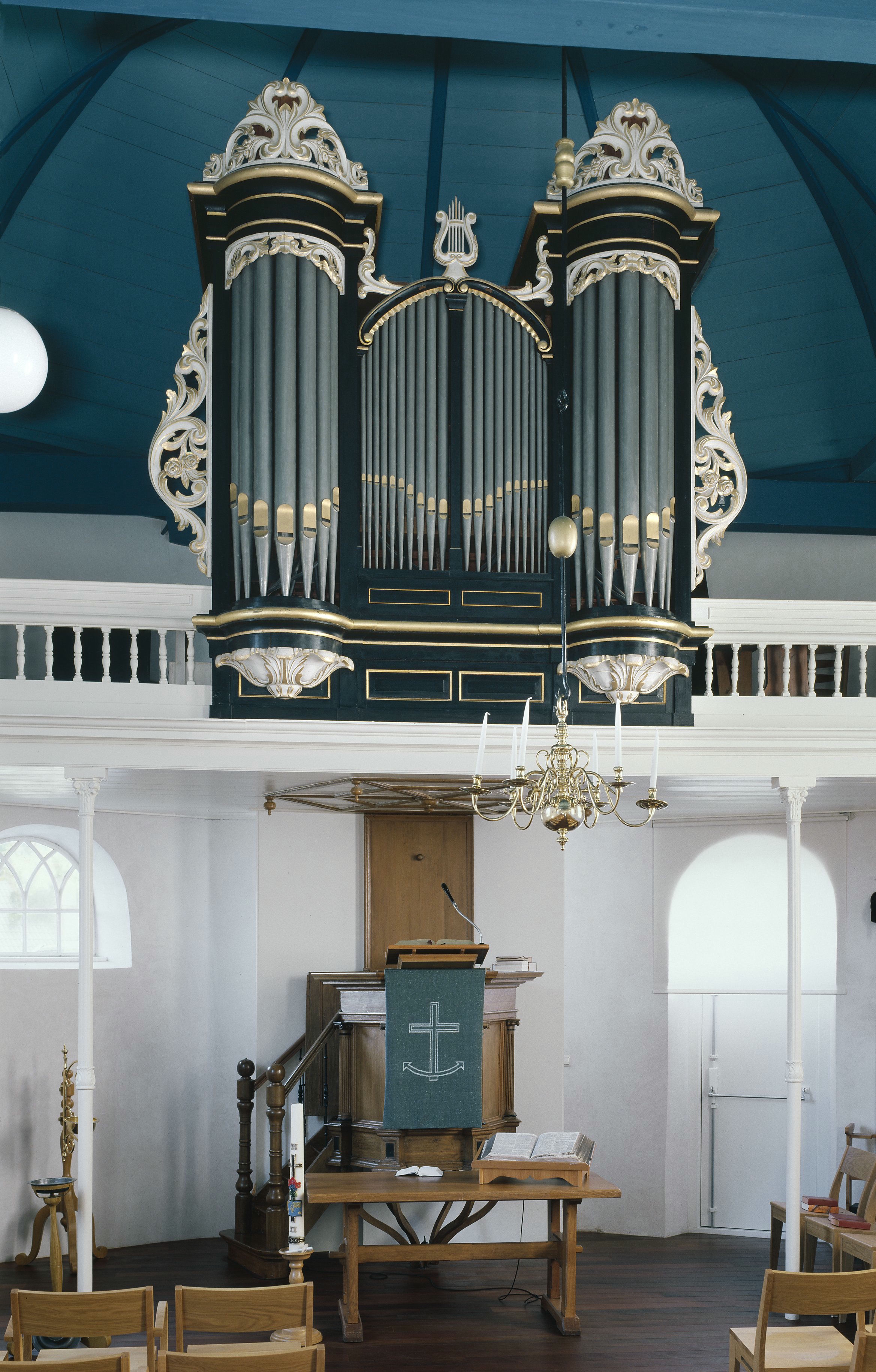 Nederlands Hervormde Kerk: Interieur, aanzicht orgel, orgelnummer 1550 (opmerking: Gefotografeerd voor Het Historische Orgel in Nederland 1886-1894, bladzijde 179 en 181)